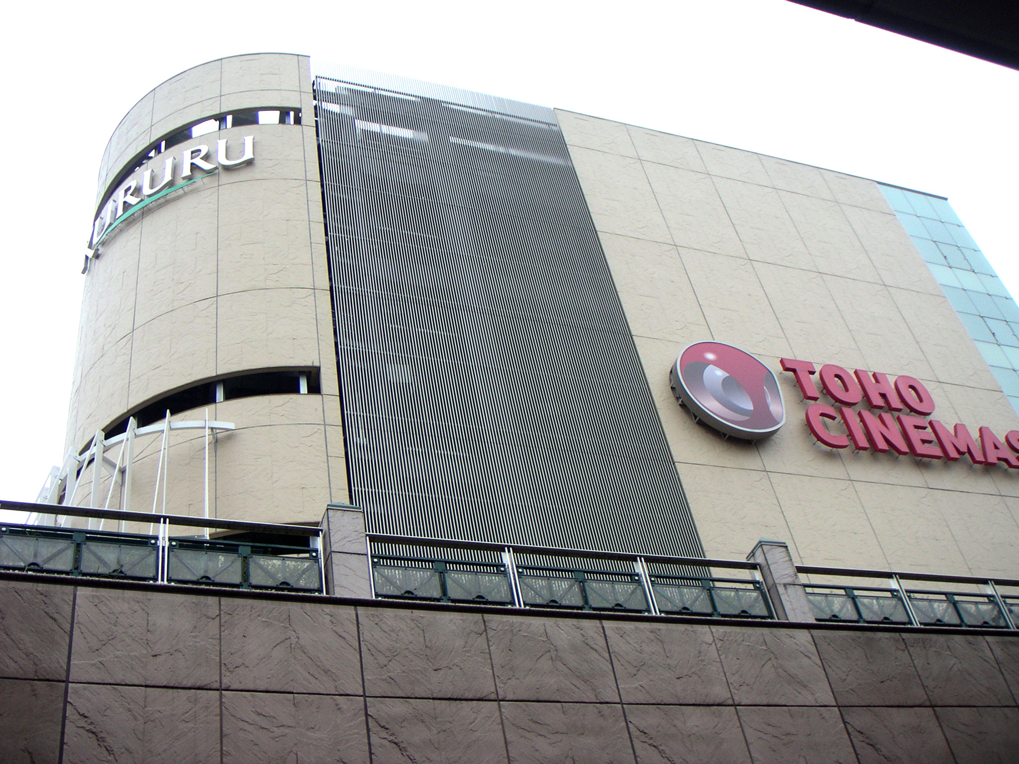 Kururu, Fuchu, Tokyo 東京都府中市のja:くるる (府中)